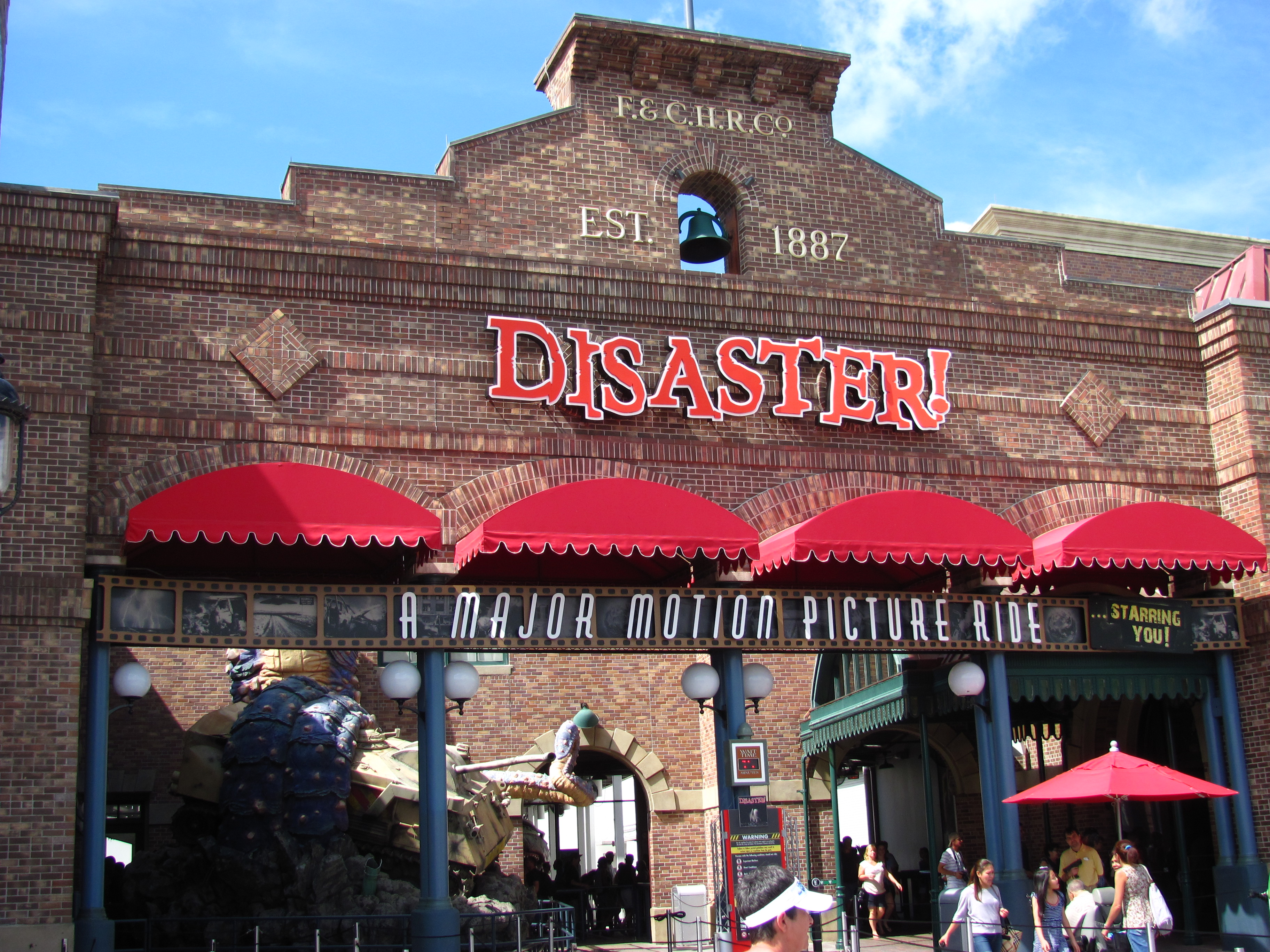 Disaster!